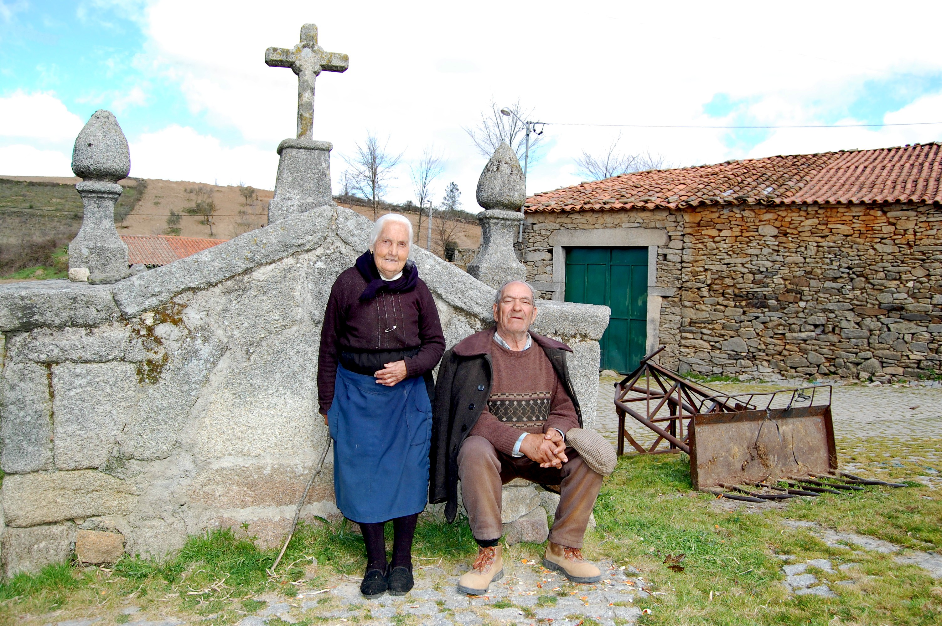 Um casal (Manuel Batista e sua mulher Isabel) da aldeia de Caçarelhos, nordeste de Portugal.